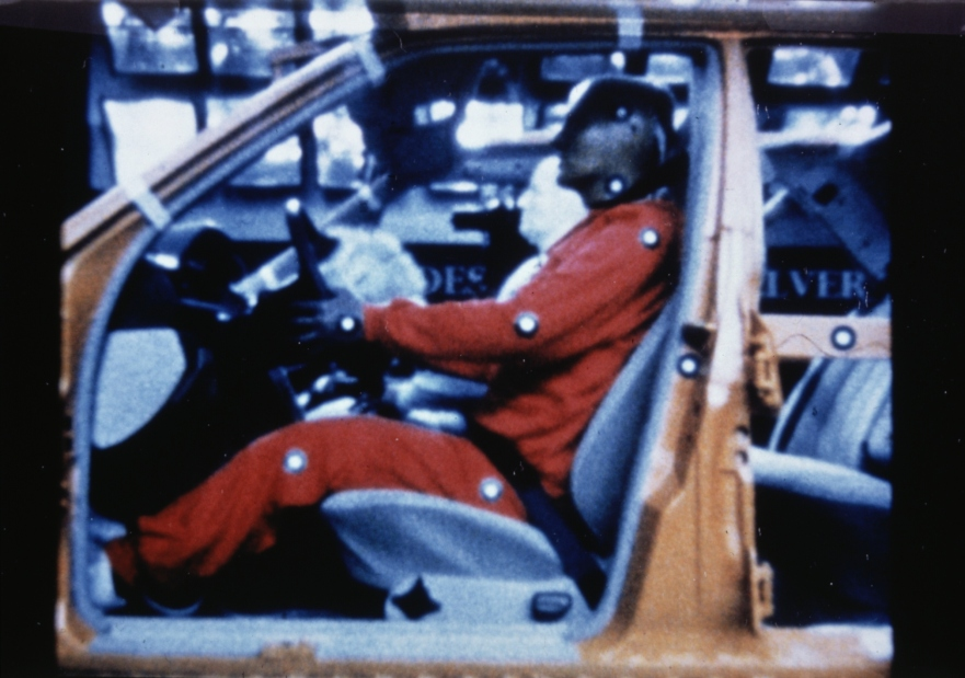 Phasenfoto der Funktionsweise von Lenkrad-Airbag und Gurtstraffer, 1981